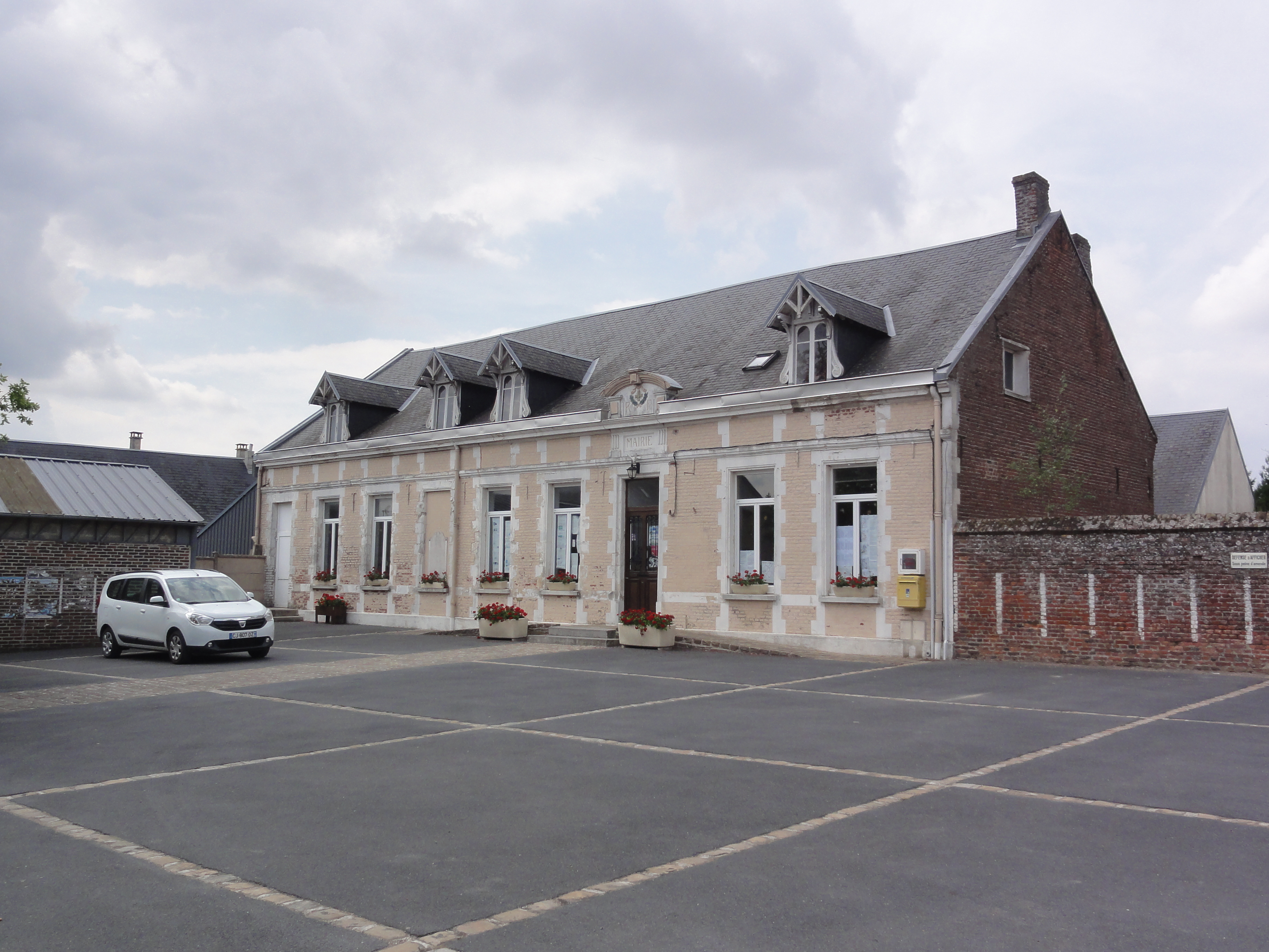 Fontaine-Notre-Dame (Aisne) mairie